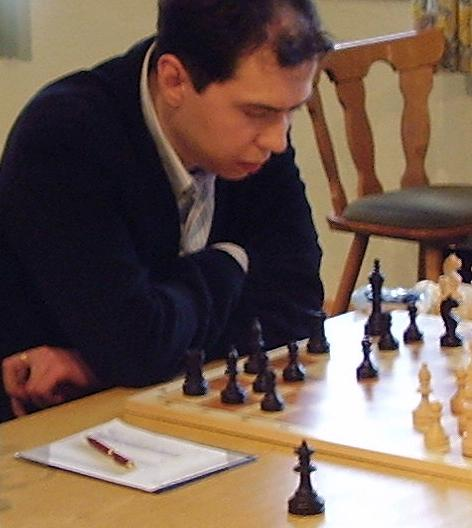 modified version of Image:Rustam Kasimdzhanov.jpg